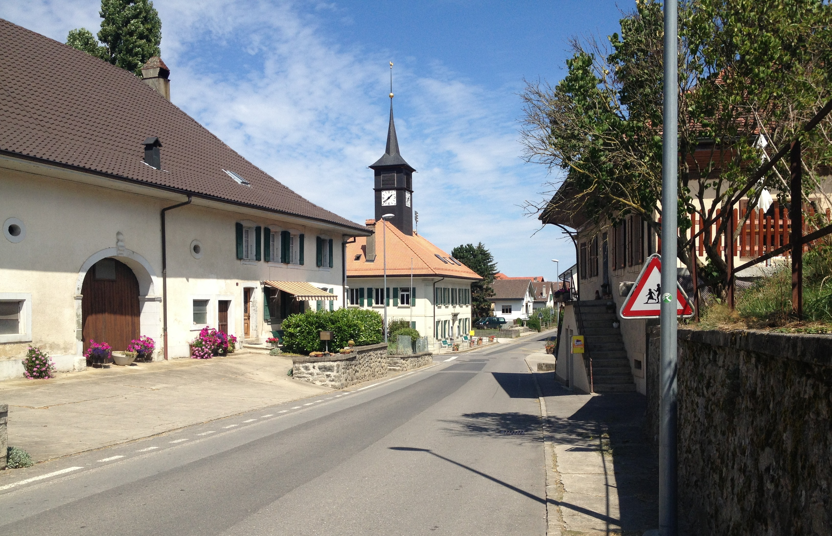 Seigneux dans la commune vaudoise de Valbroye en Suisse.